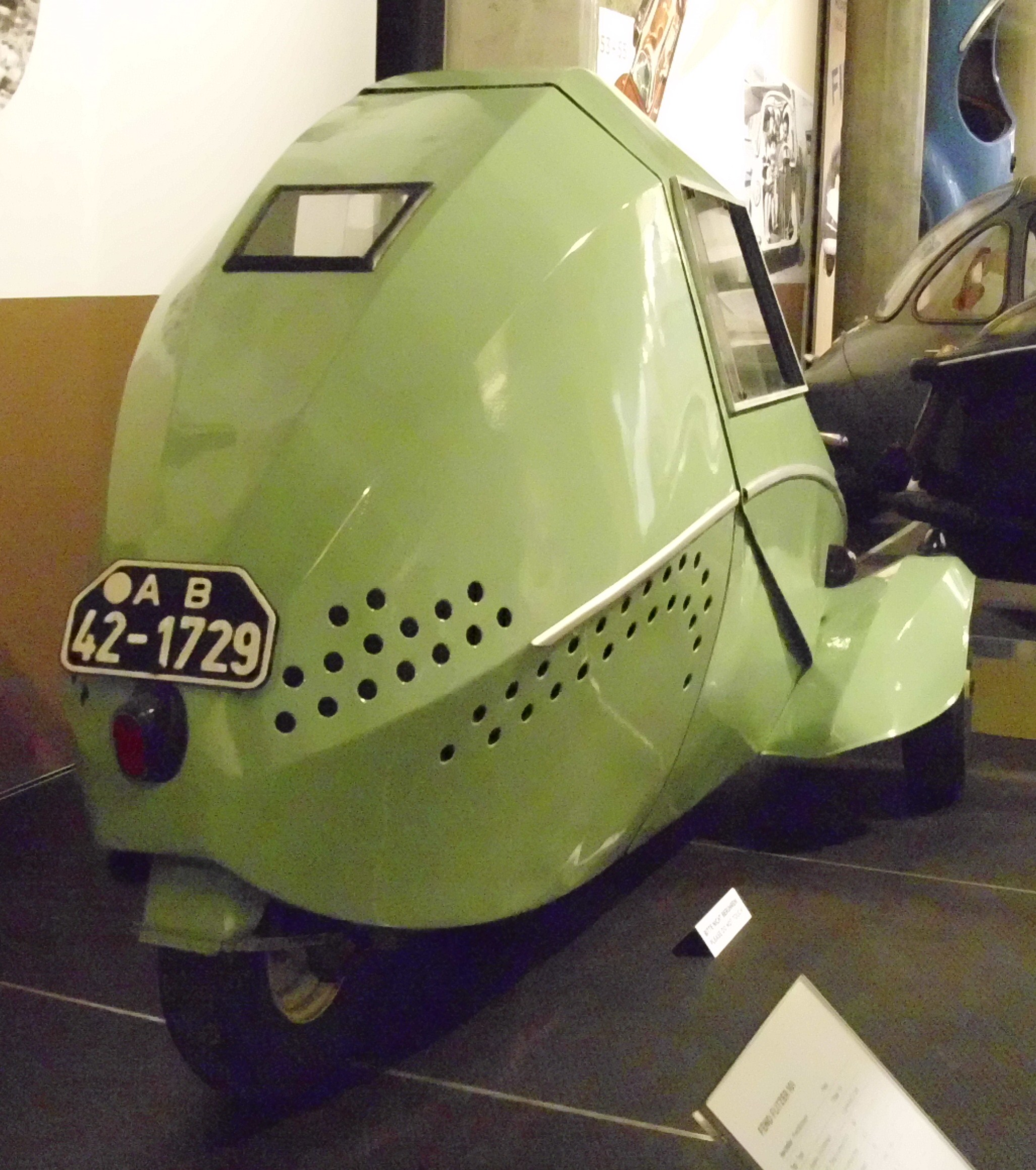 Fend Flitzer 101 1948-1951